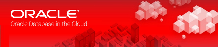 Монгол: Зураг 3.Oracle